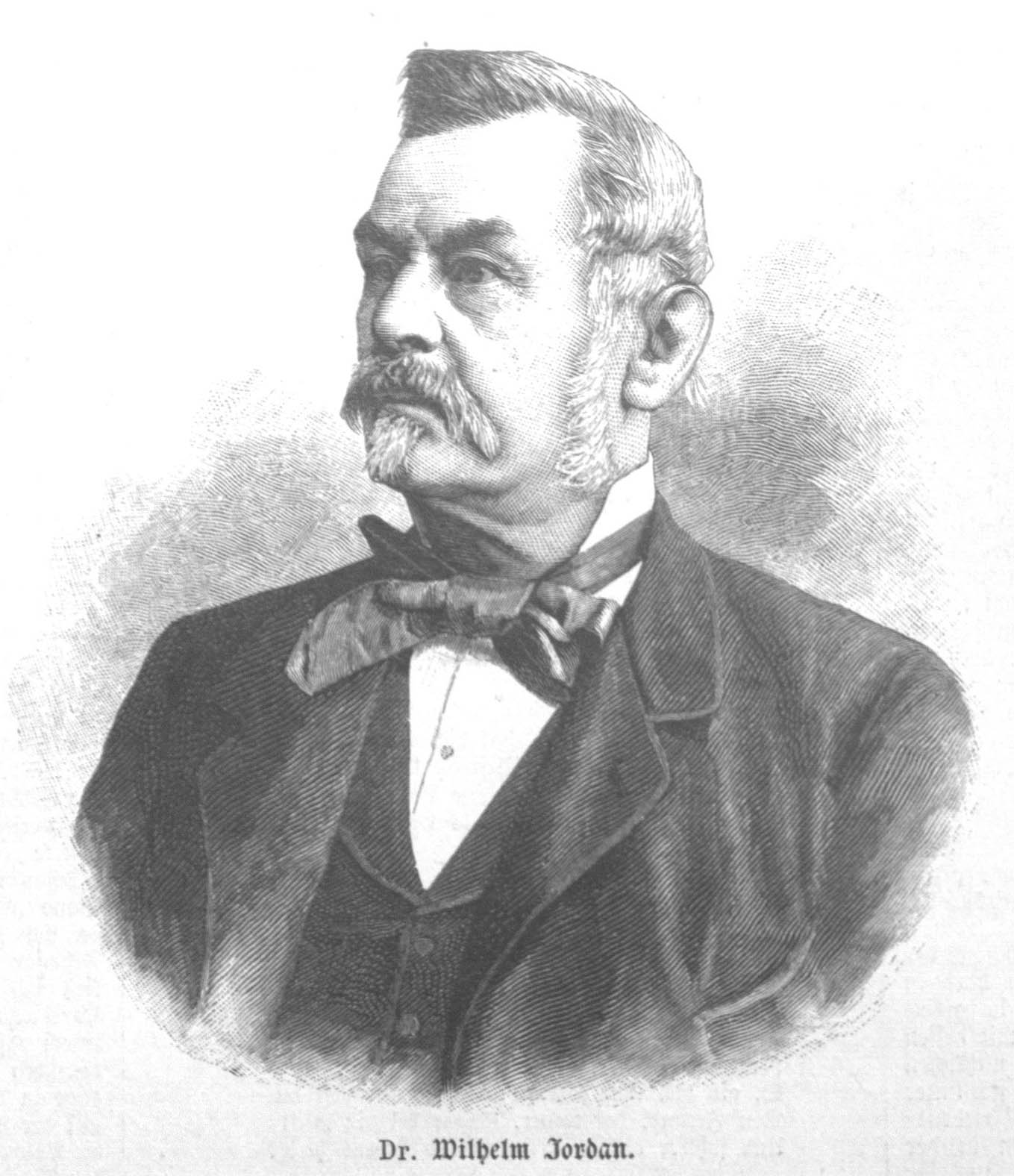 Portrait von Carl Friedrich Wilhelm Jordan (Schriftsteller und Politiker)